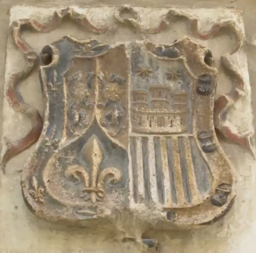 EscudoPolancoSalamancaConventoSantaClara